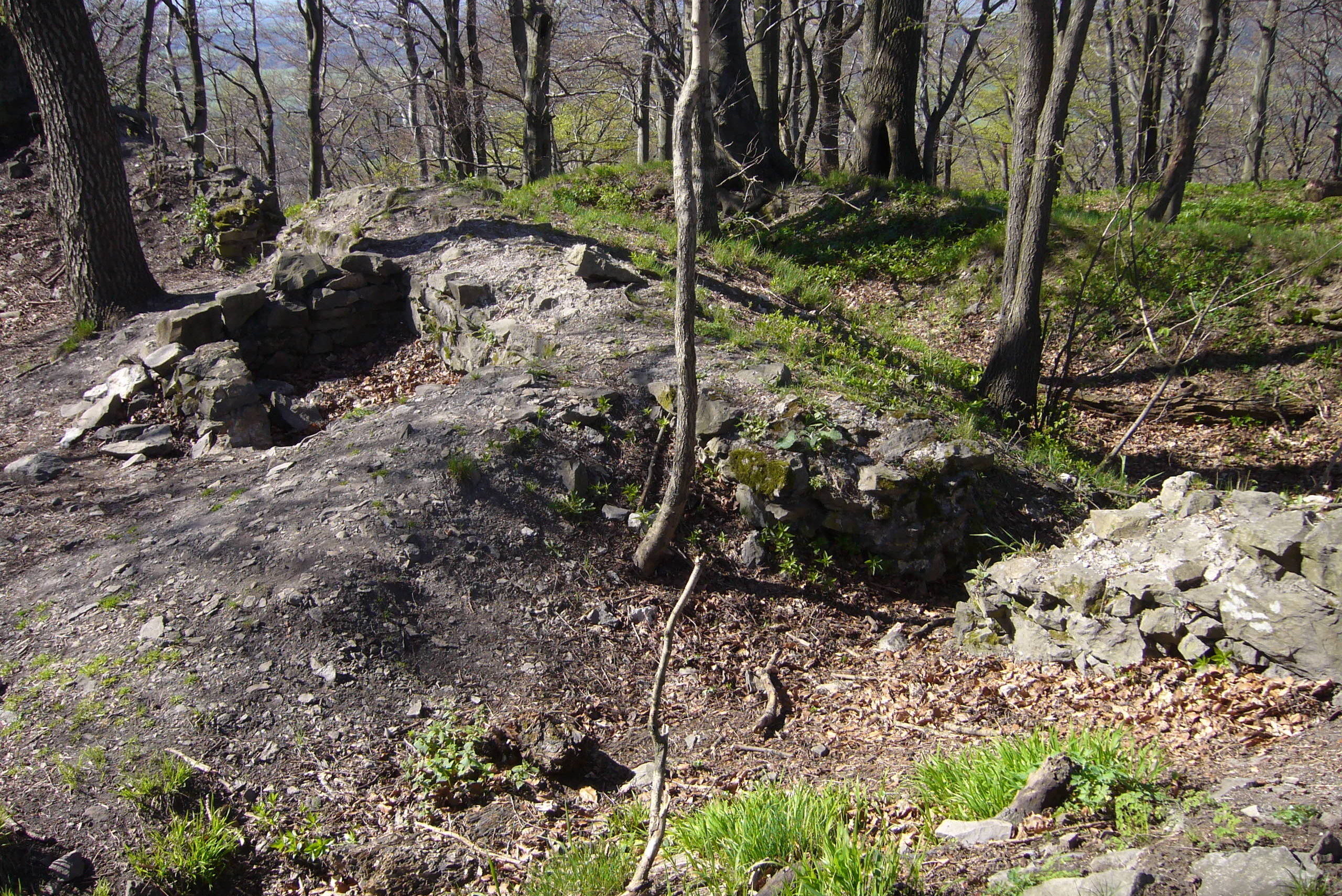 Falkenburk – východní stavba